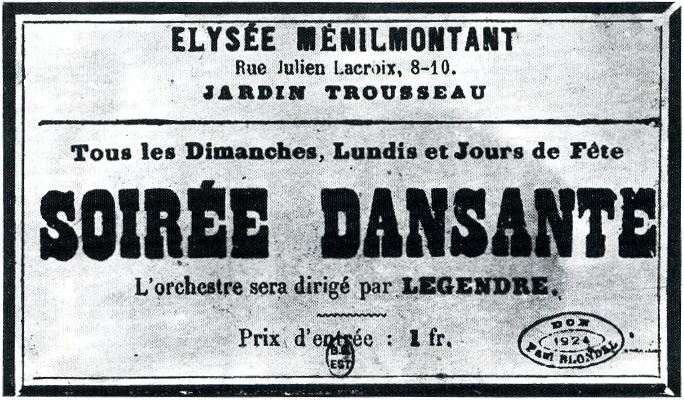 Encadré publicitaire pour le bal de l'Elysée Ménilmontant